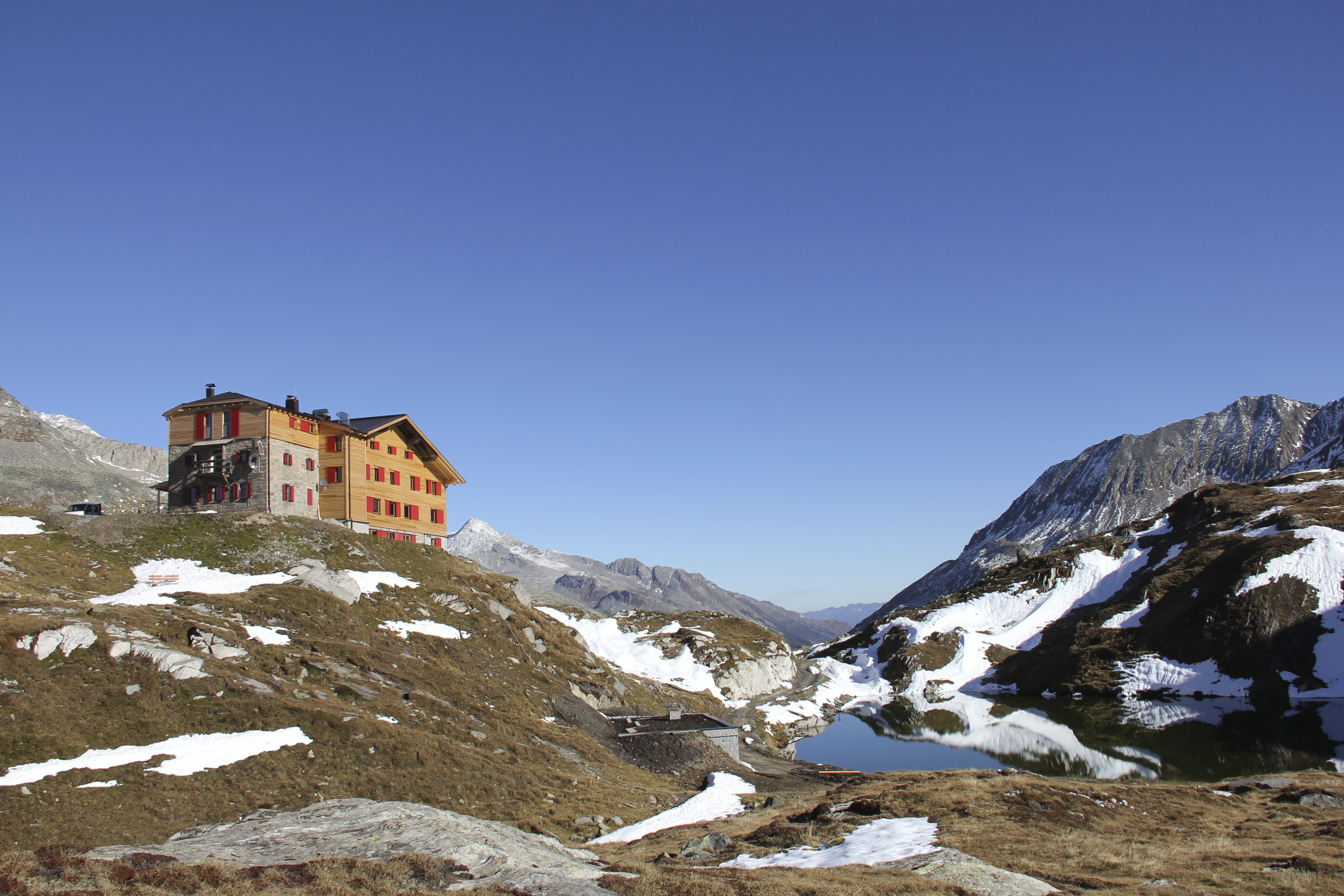 Pfitscherjochhaus mit Jochsee und Blick ins Zillertal.